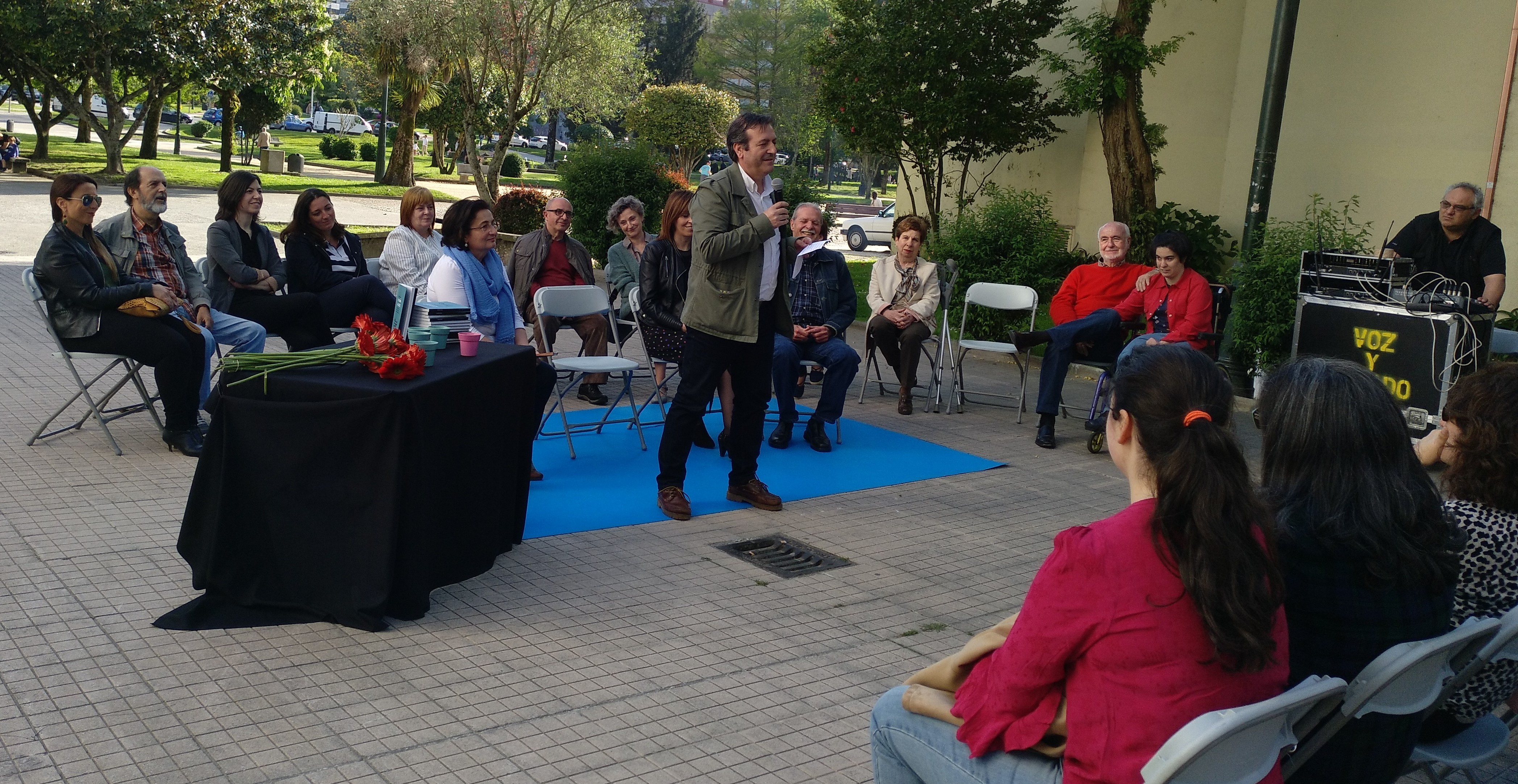 O escalón de Ulises. A Pontevedra dos afectos de María Victoria Moreno, a mestra que escribía libros. Autora: Montse Fajardo. Presentación en Pontevedra o 05/05/2018